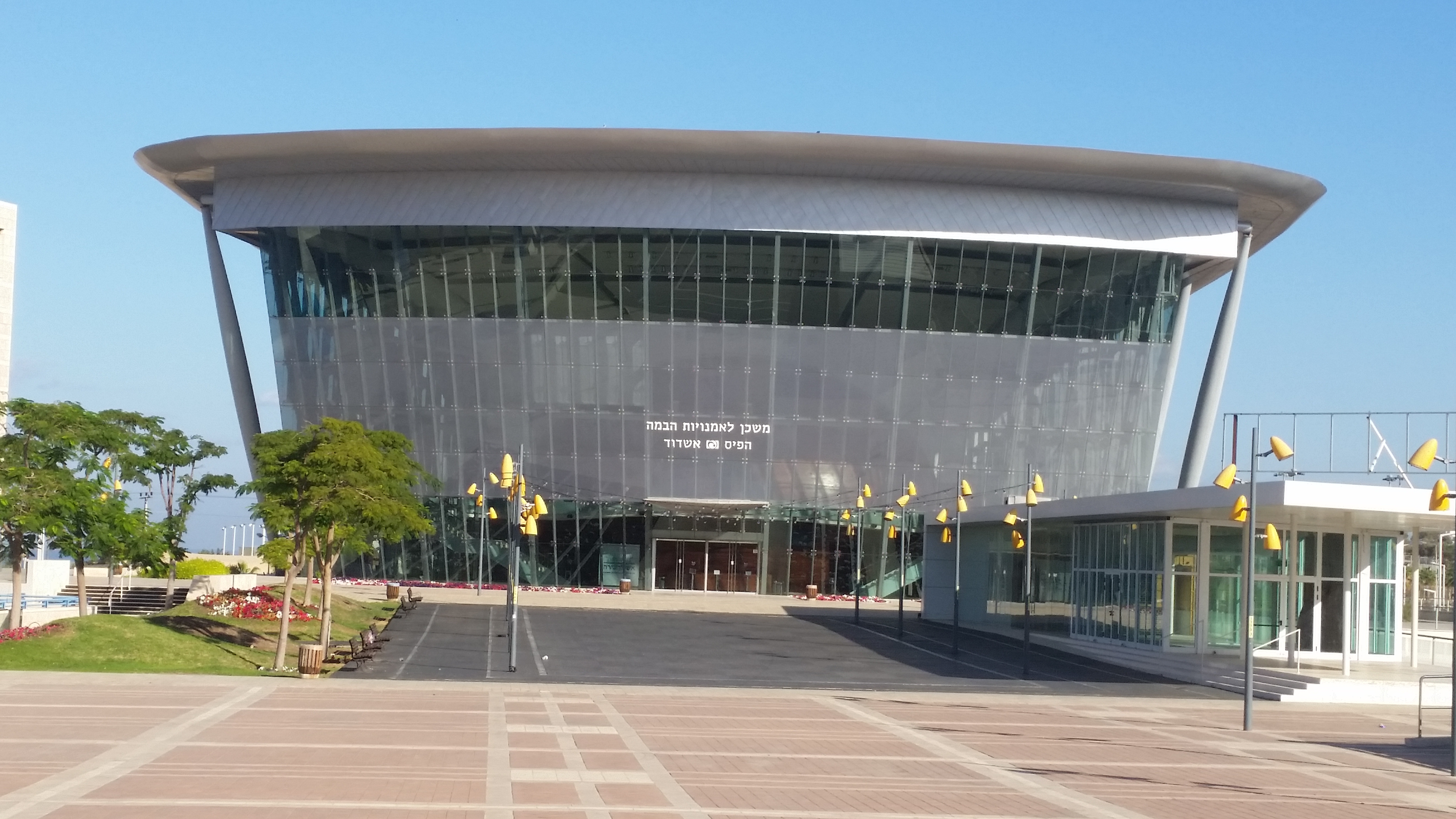 המשכן לאומנויות הבמה באשדוד